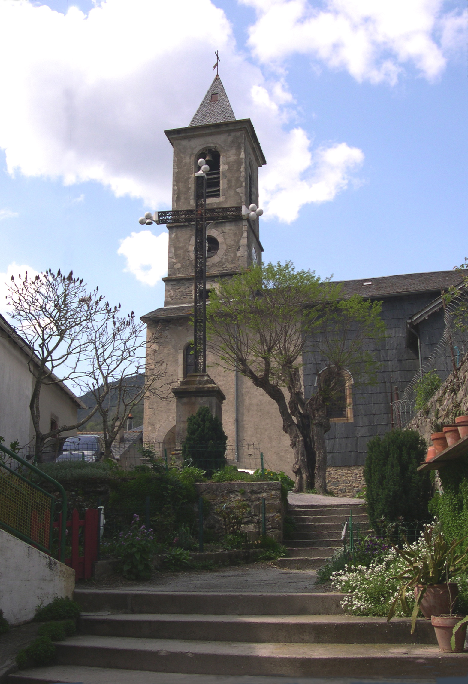 Arnac-sur-Dourdou (Aveyron) - Église Saint-Benoit.